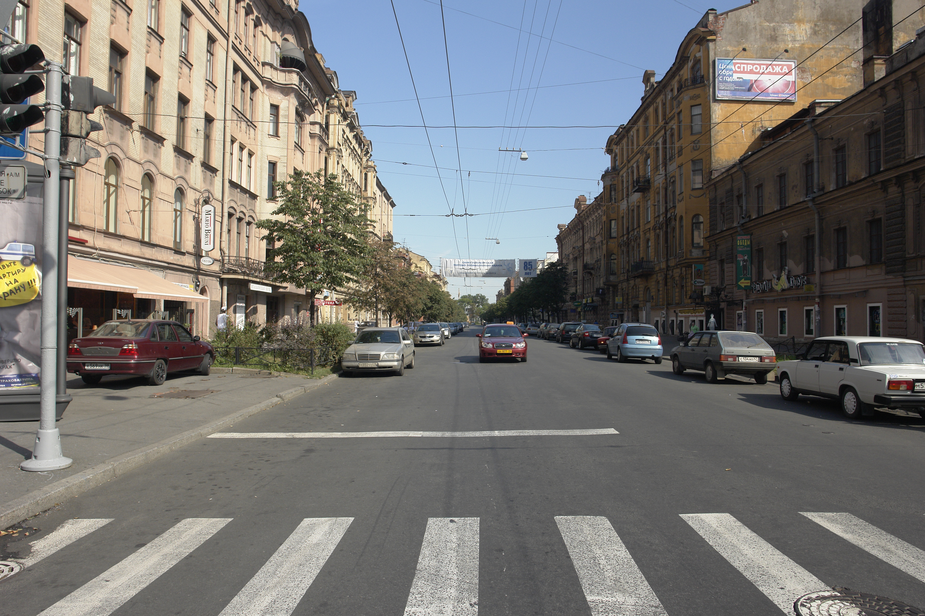 улица Чайковского (Санкт-Петербург), вид с проспекта Чернышевского в сторону Таврического сада.